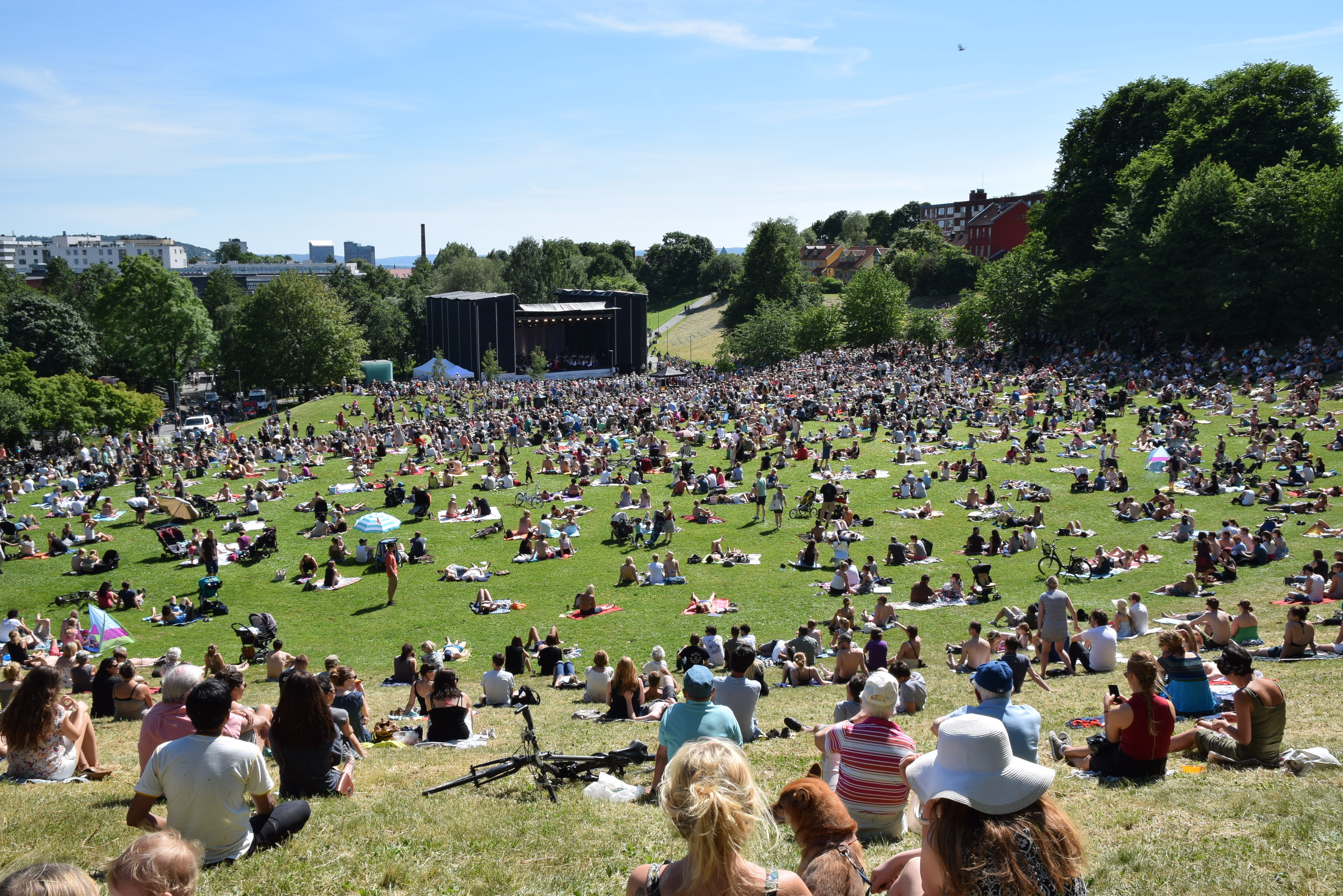 Oslo-Filharmonien på Myraløkka, Sagene, Oslo, 15. juni 2014